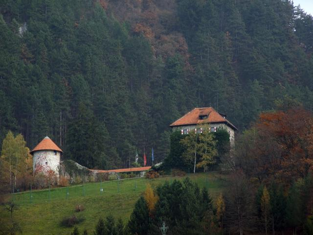 Tabor erődje Laško felett, Szlovénia